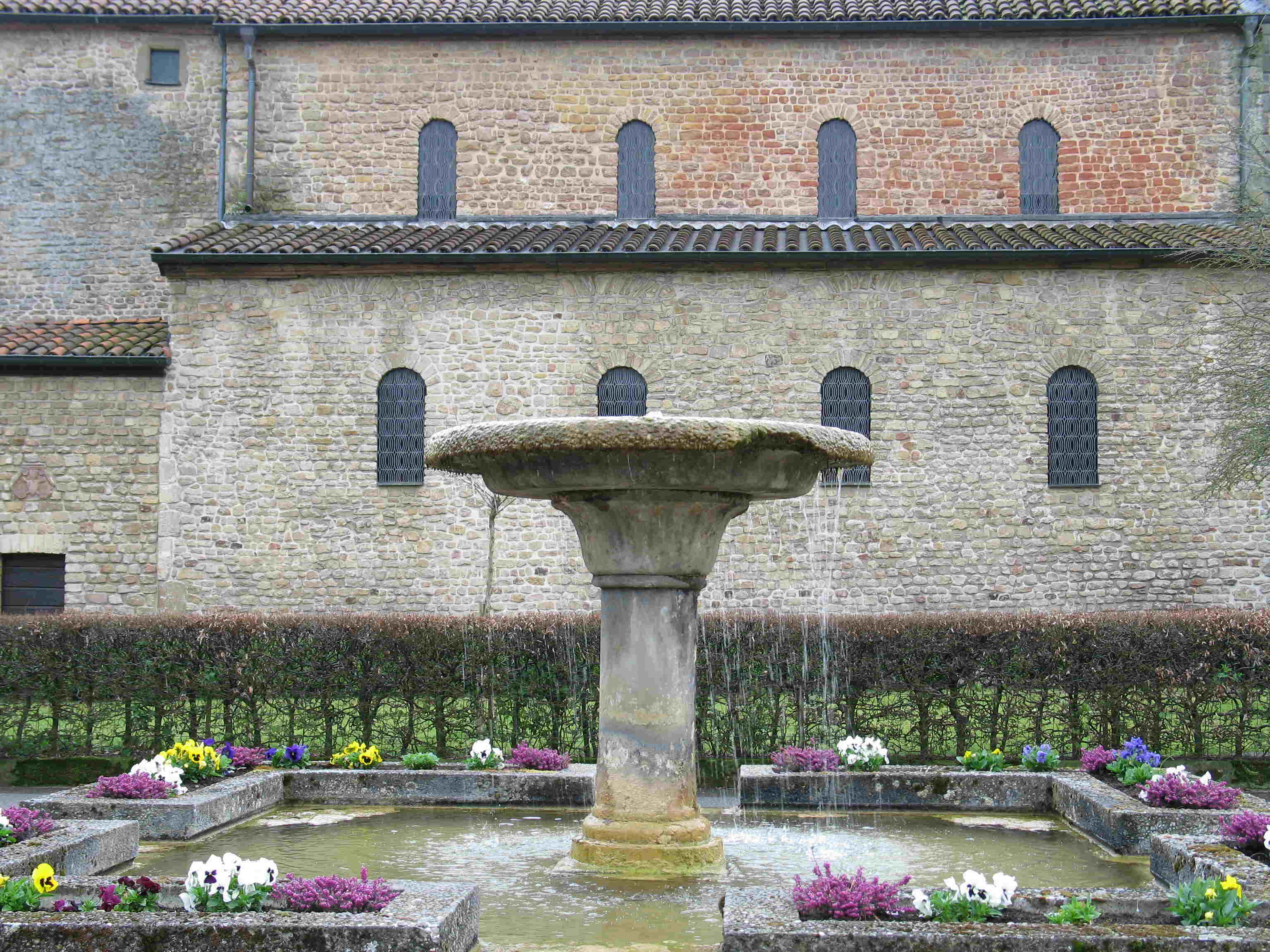 Plaz bei der Kierch zu Sëll. Kategorie:Gemeng Sëll